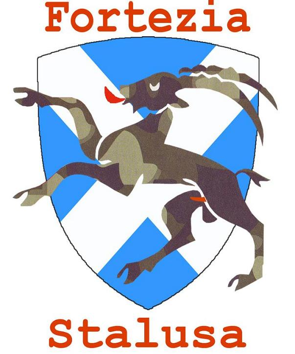 Logo des Vereins Festung Stalusa, Disentis GR, Schweiz